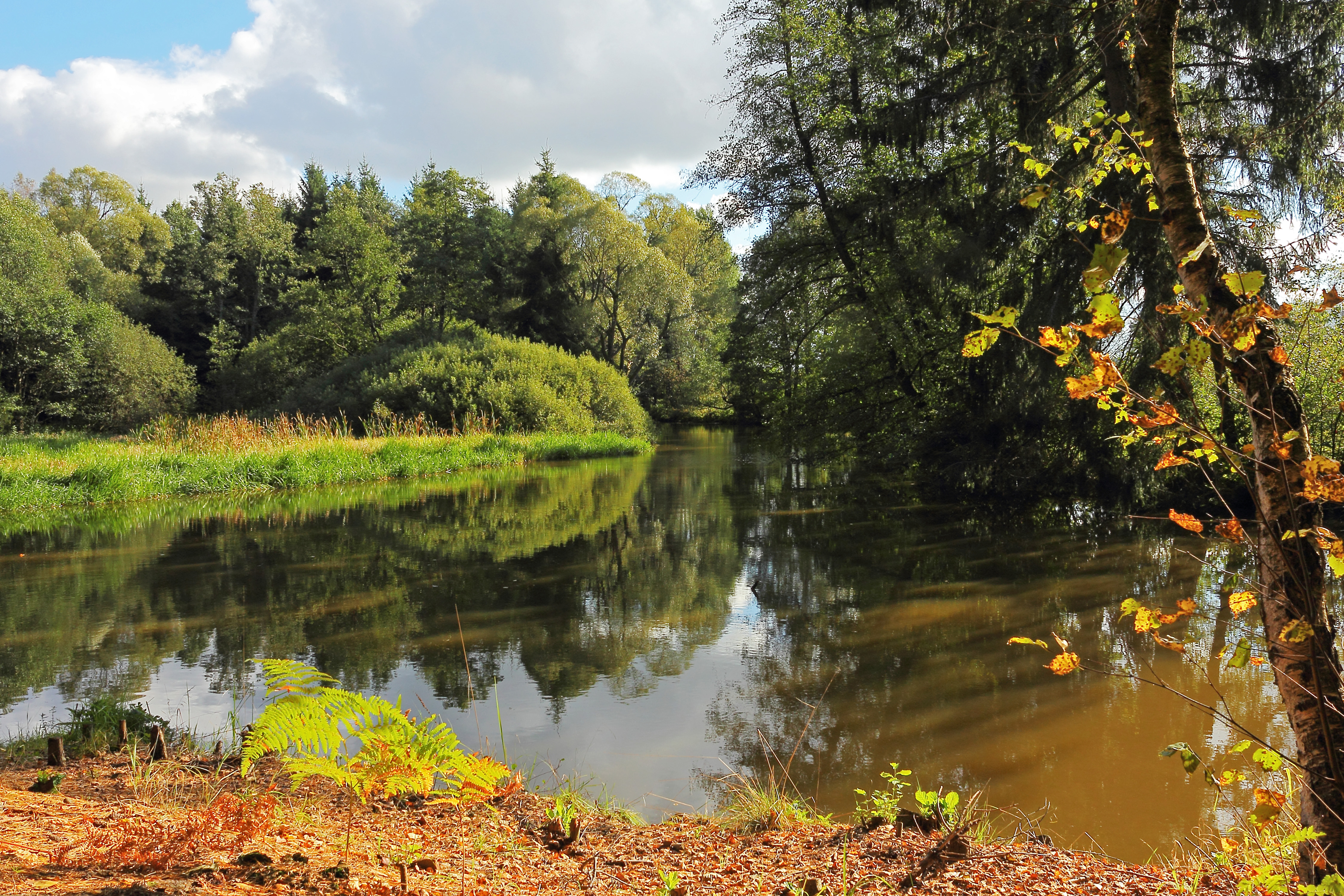 Braunaubach zwischen Kleedorf und Hoheneich